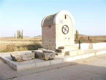 Caño de Villalbarba